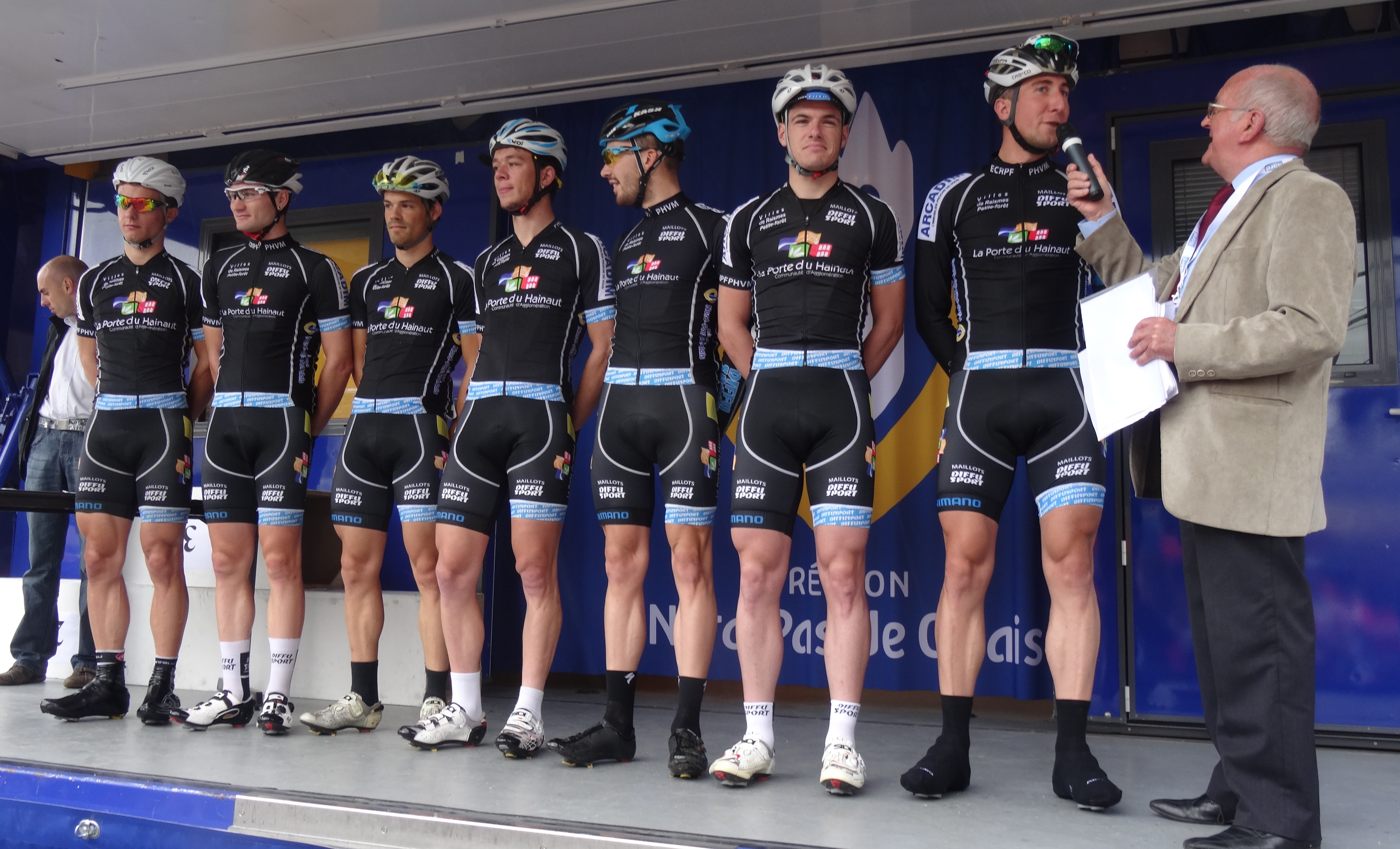 Reportage photographique réalisé le dimanche 13 juillet à l'occasion du départ et de l'arrivée de la Ronde pévéloise 2014 à Pont-à-Marcq, Nord-Pas-de-Calais, France.